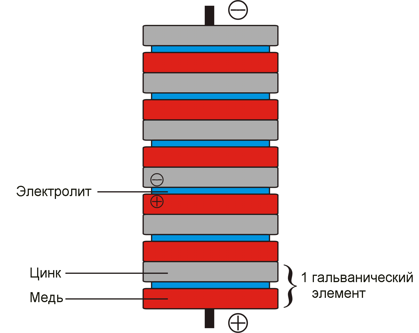 Вольтов столб — батарея из шести элементов Вольта.